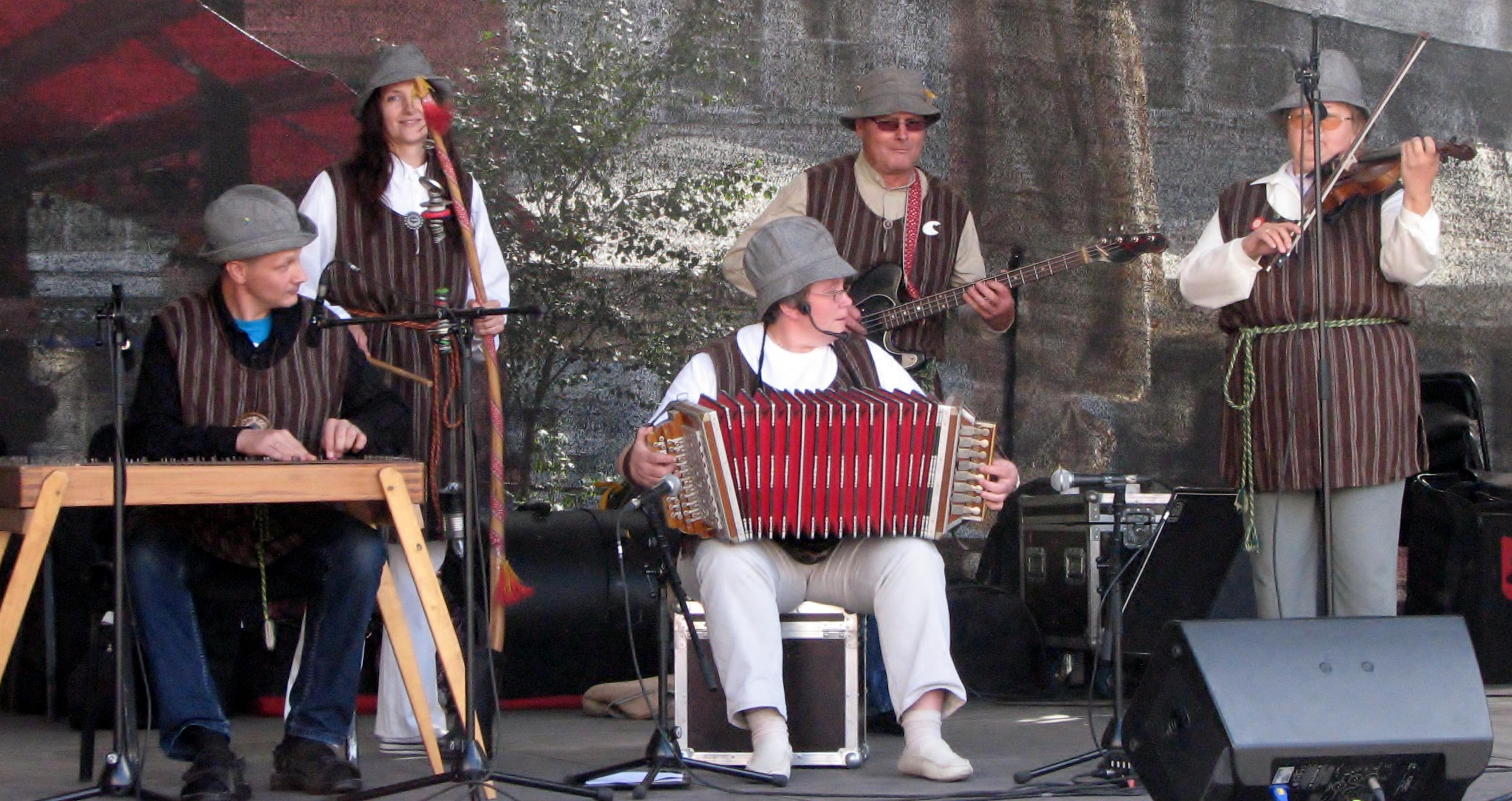 Väägvere külakapell esinemas üritusel "Ava lava, Tallinn!"